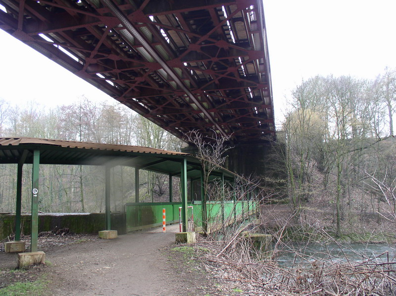 Fußgängerbrücke und Stahlfachwerkbrücke der Bahnstrecke Gruiten–Köln-Mülheim in der Wupperschleife in Leverkusen